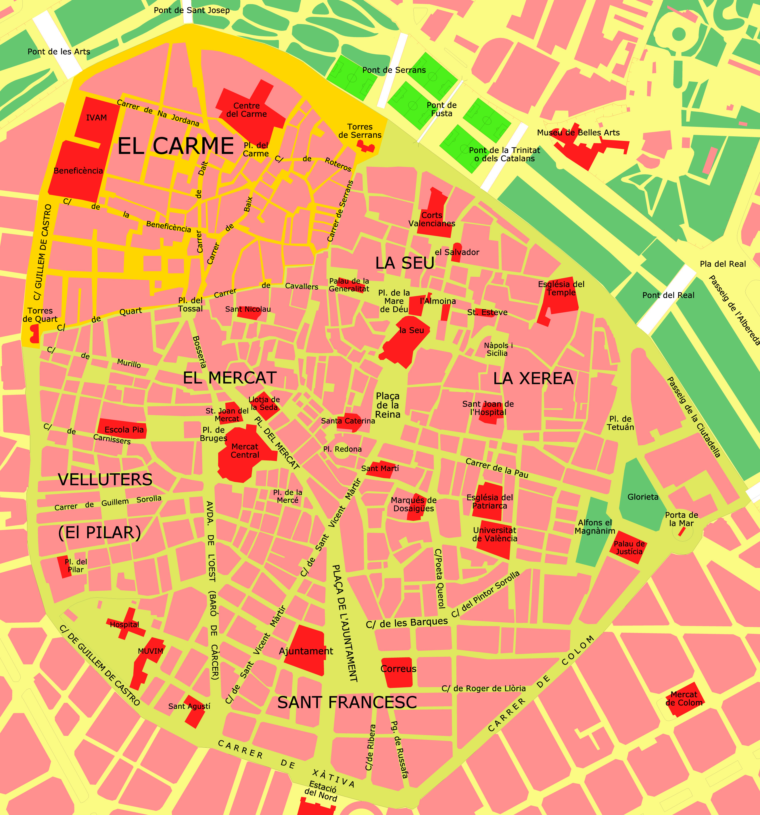 Barri del Carme, districte de Ciutat Vella (València)